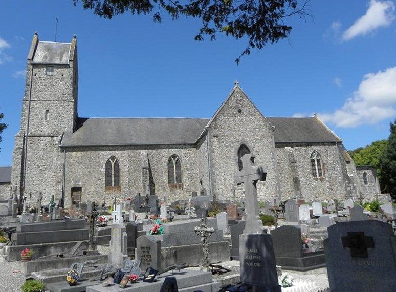 Vue méridionale de l'église Saint-Martin à Saussey (50).